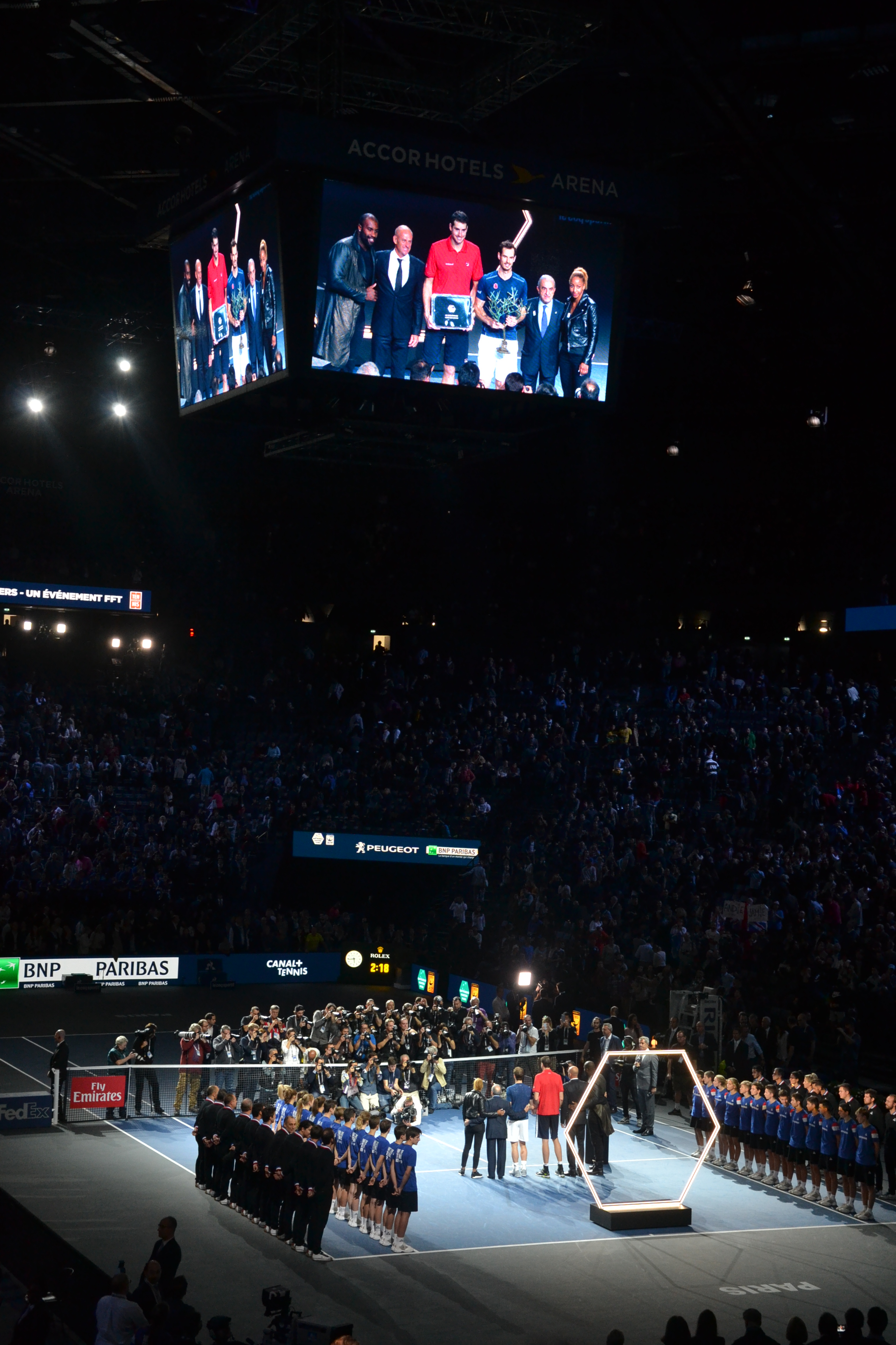 Finale de l'édition 2016 du Masters 1000 de tennis masculin de Paris Bercy, entre Andy Murray et John Isner.